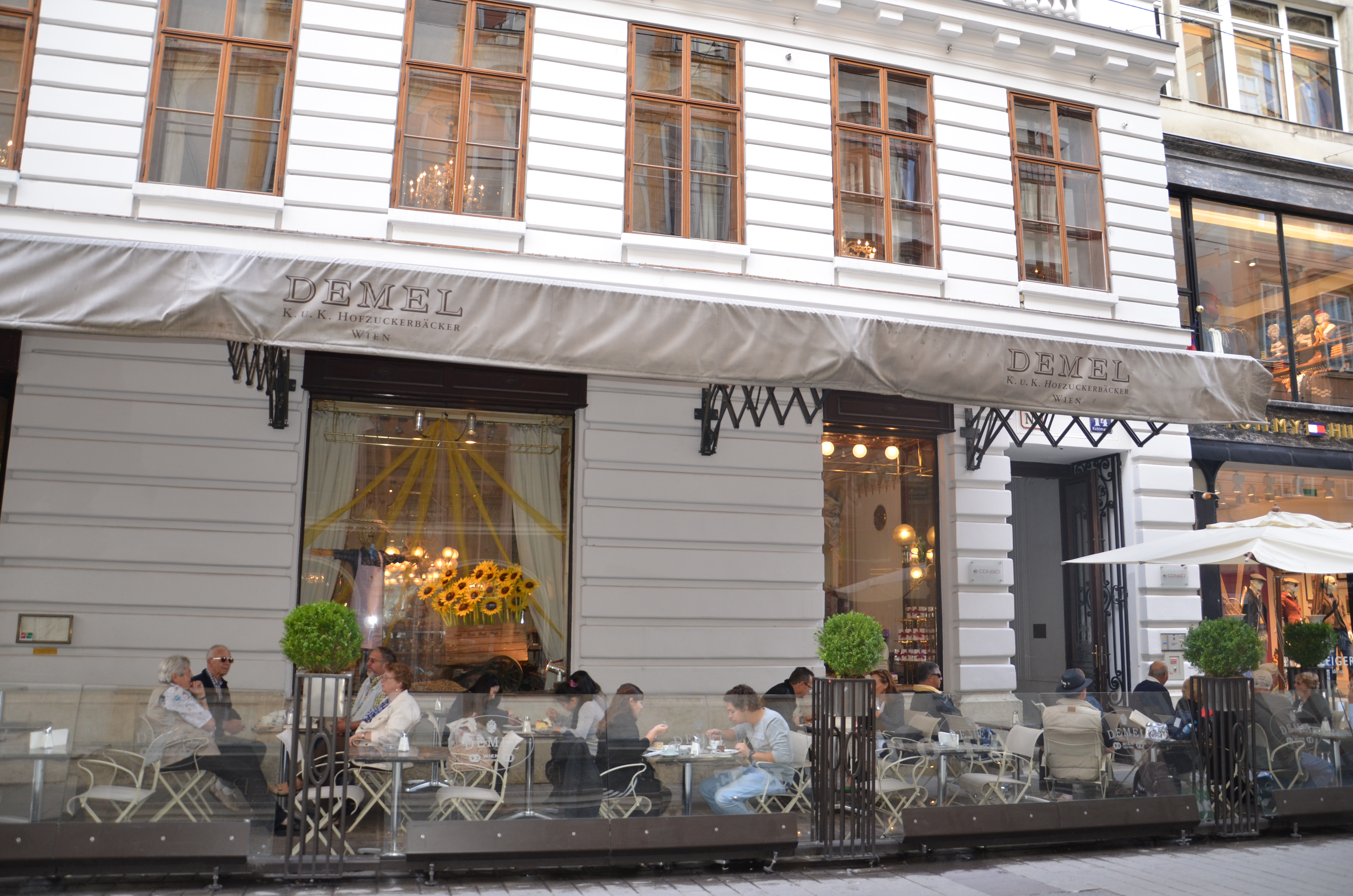 Konditorei Demel in Wien